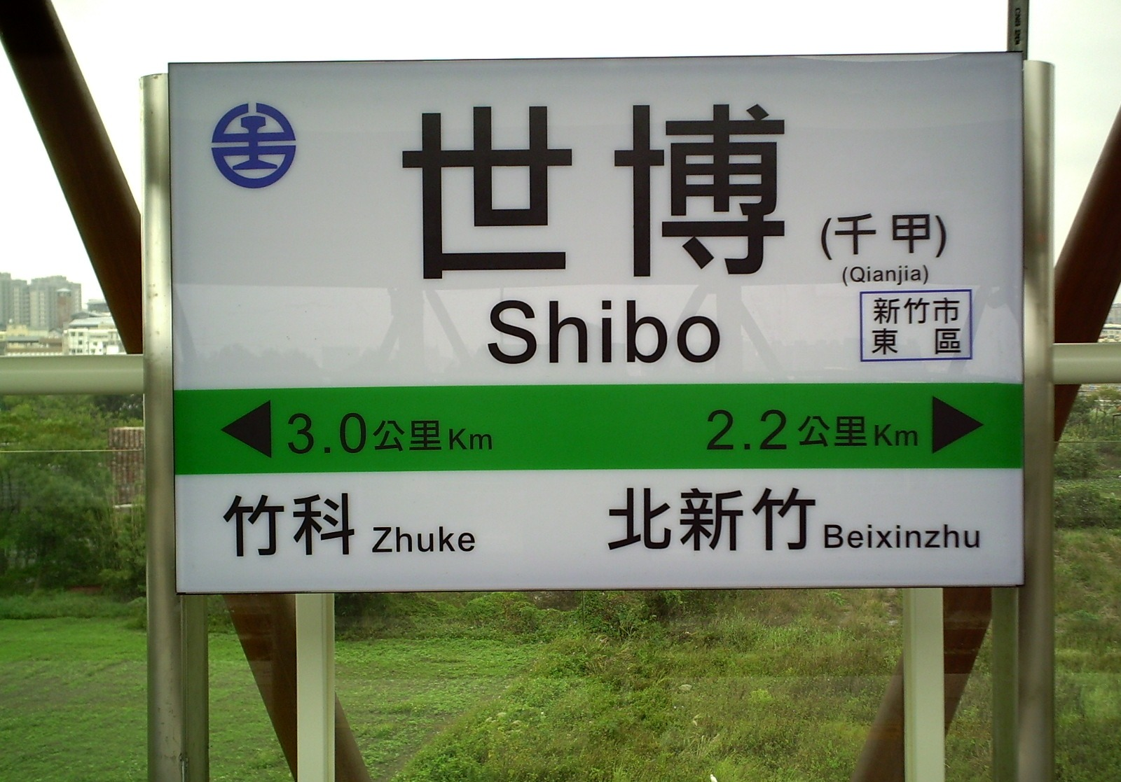 臺鐵千甲車站改名前的站名牌，標示著世博（千甲）。